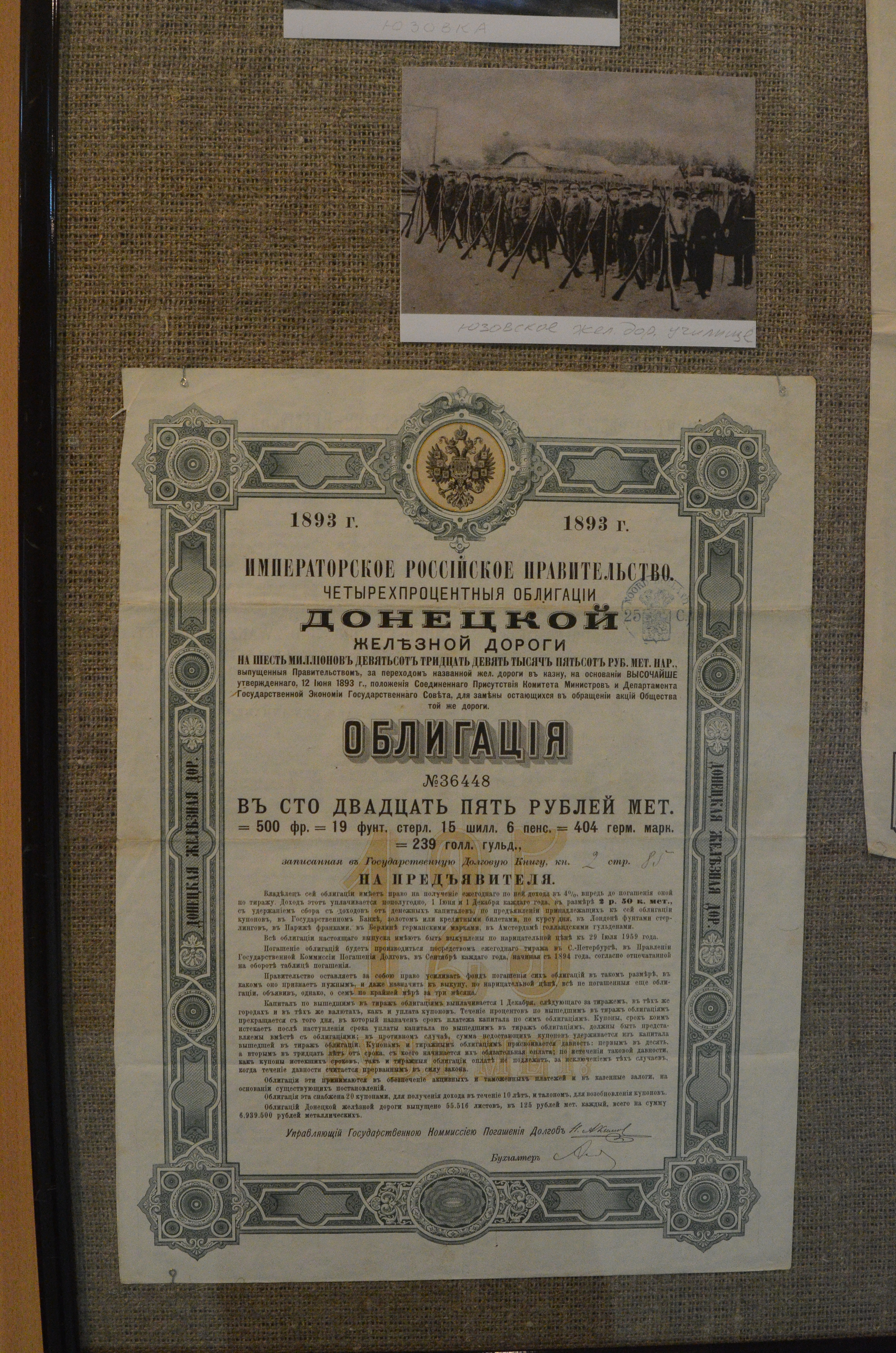 Донецк. Ночь индустриальной культуры.